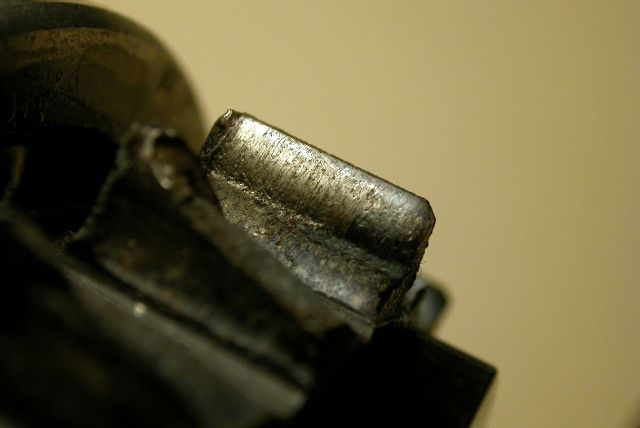 Grippage sur une dent d'engrenage